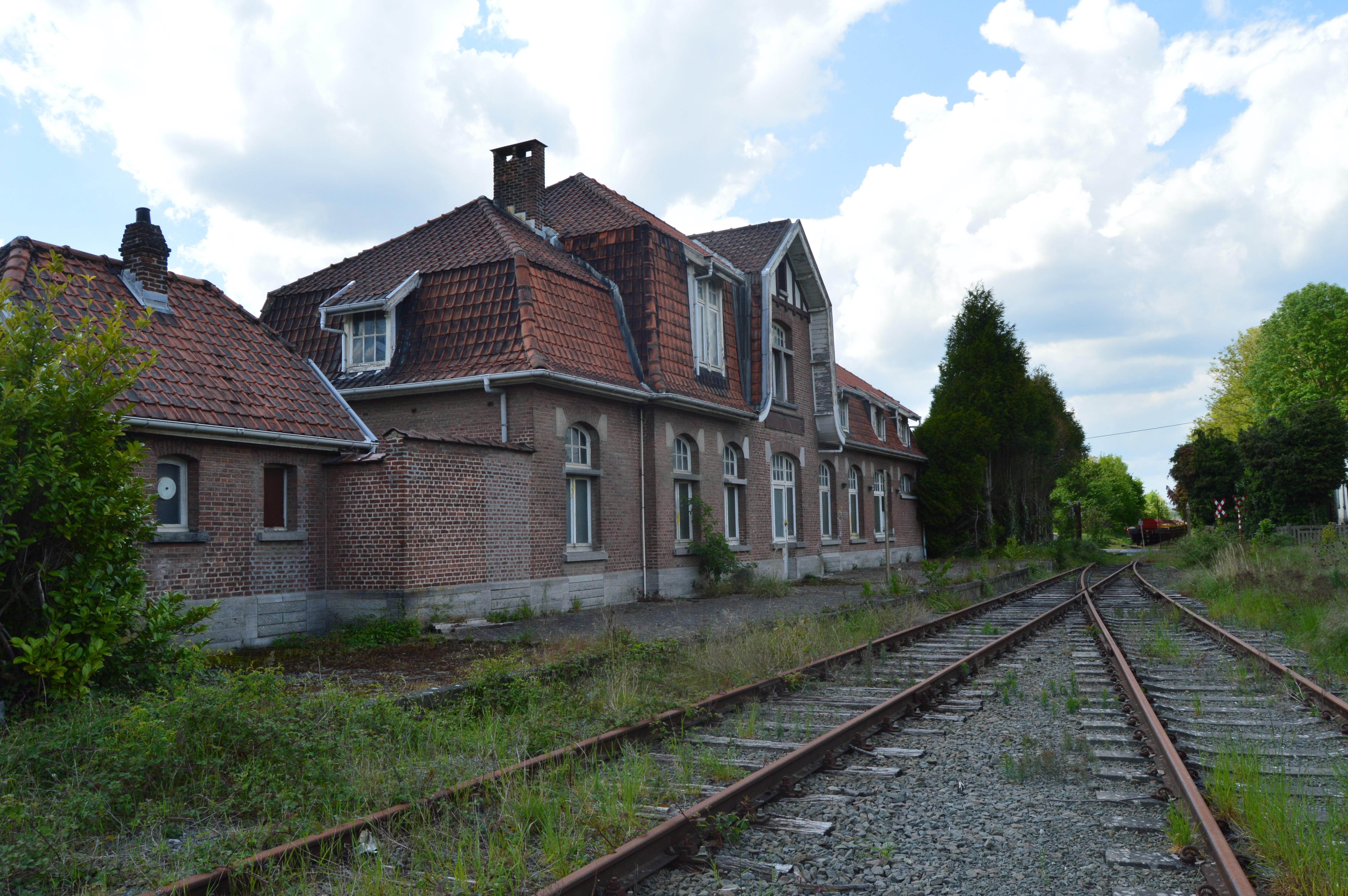 Gare d'Ollignies vue depuis ce qui reste des quais.